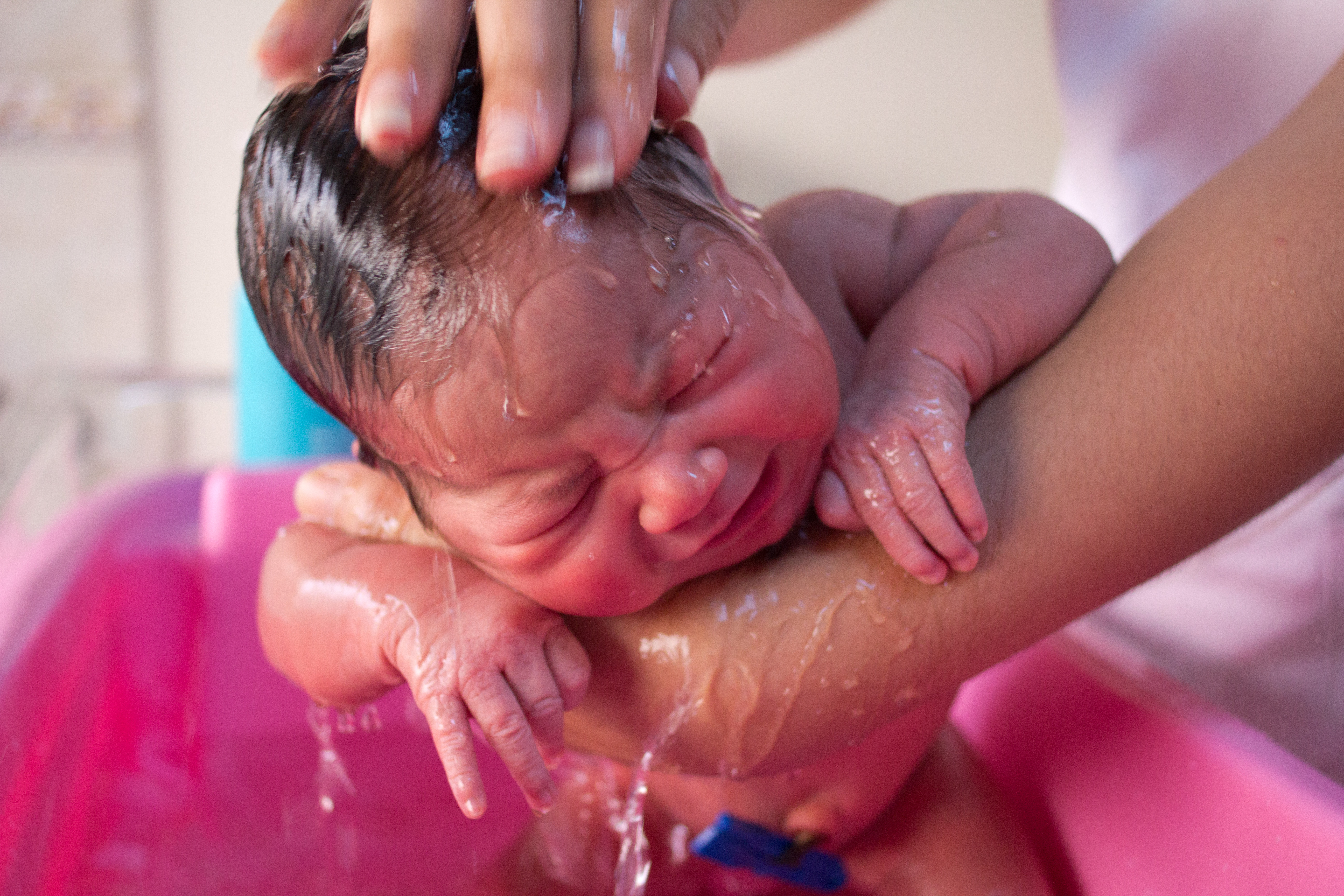 Bebê tomando banho.